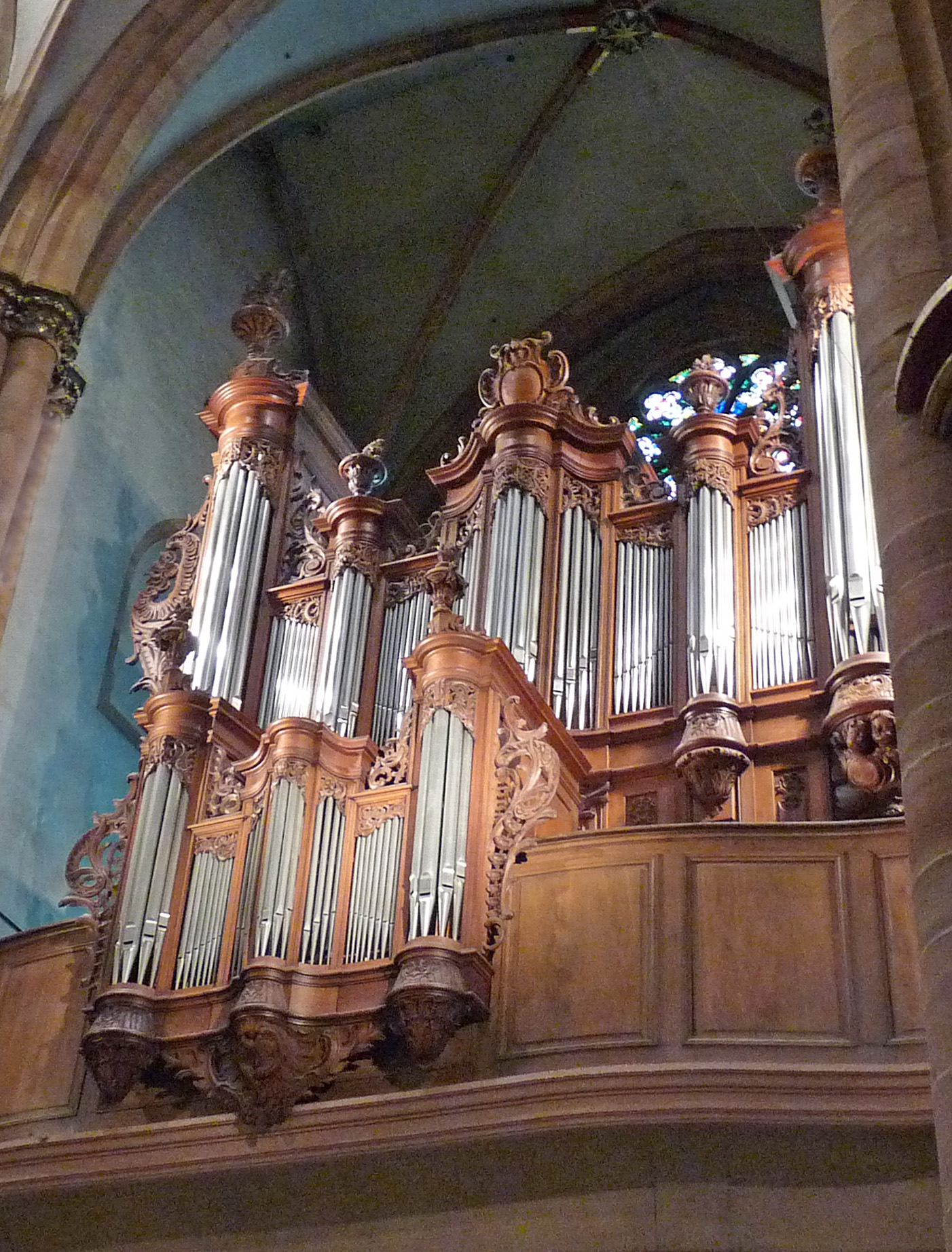 Collégiale Saint-Martin de Colmar : orgue de R.Freitag (Orgelbau Felsberg, 1979)